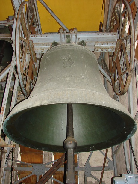 Kirche St. Augustinus, München-Trudering (Augustinusglocke as°)